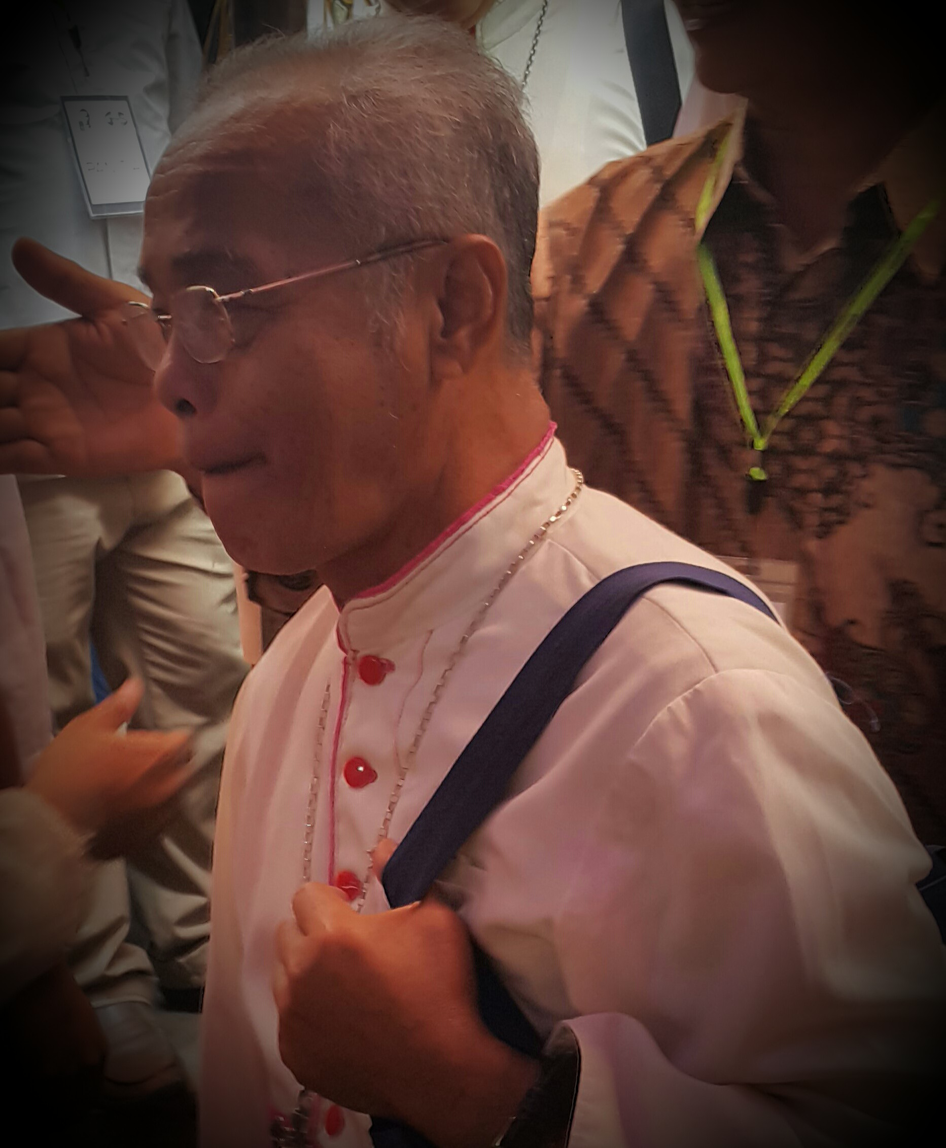 Mgr. Aloysius Murwito, Uskup Agats-Asmat